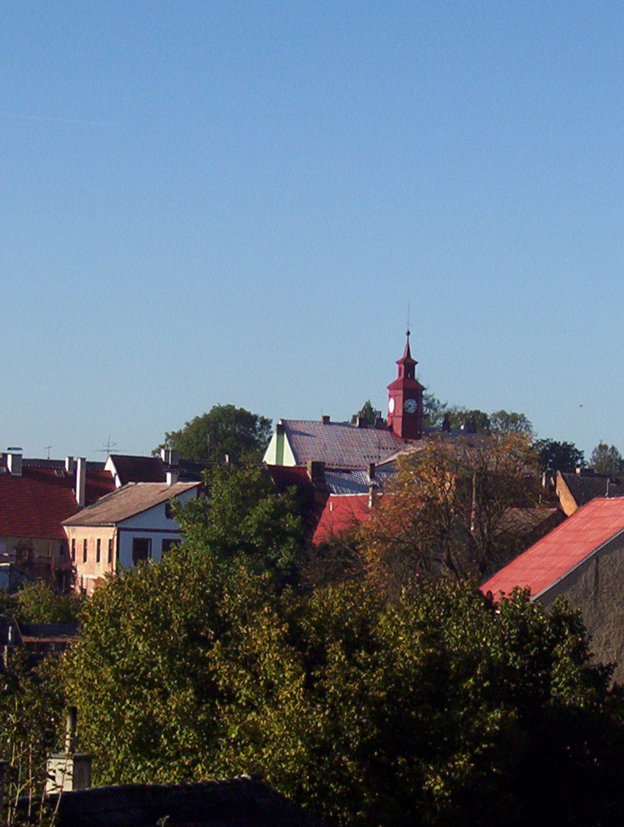 Fotografie Dubé A geocoded location could be added to this image. Visit Commons:Geocoding for information on how to add coordinates. Beta-test: Add coordinates helps to determine coordinates.